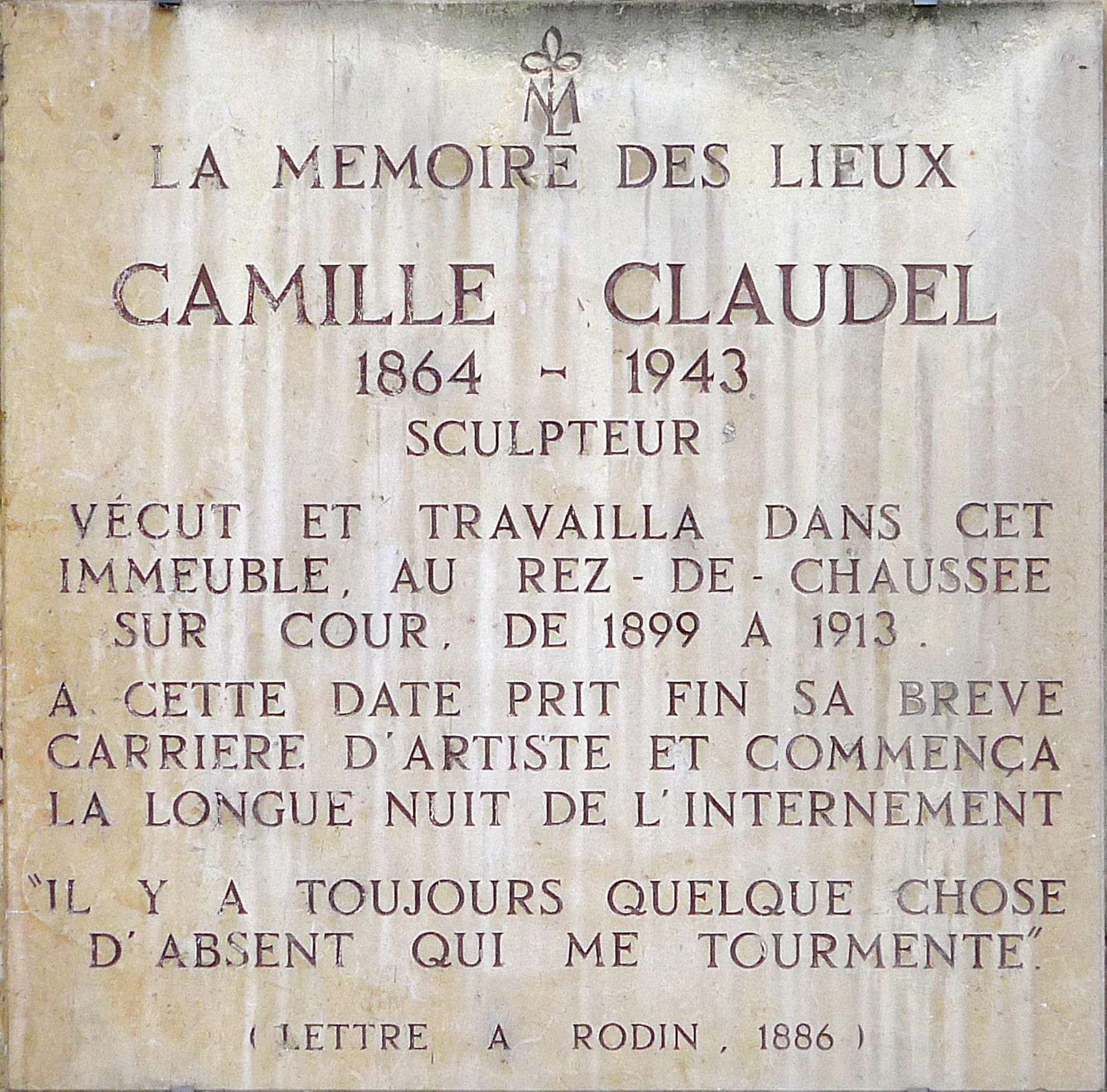 Quai de Bourbon (n°19 : hôtel de Jassaud, plaque honorant Camille Claudel) - Paris IV